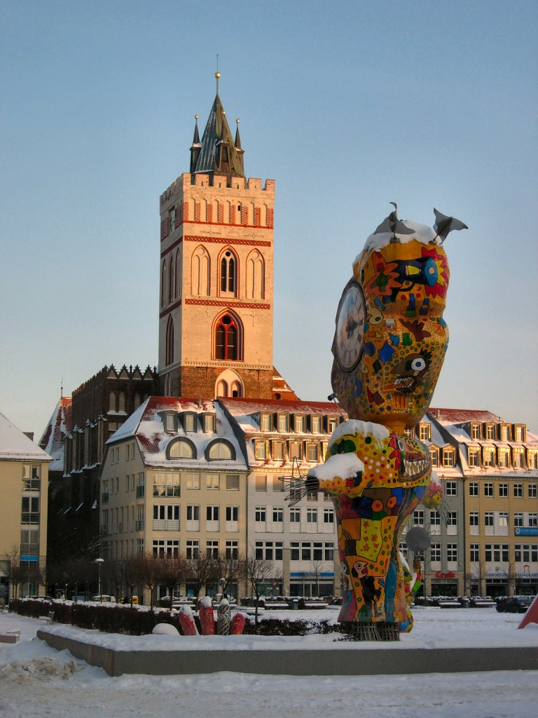 Marienkirche in Frankfurt (Oder)